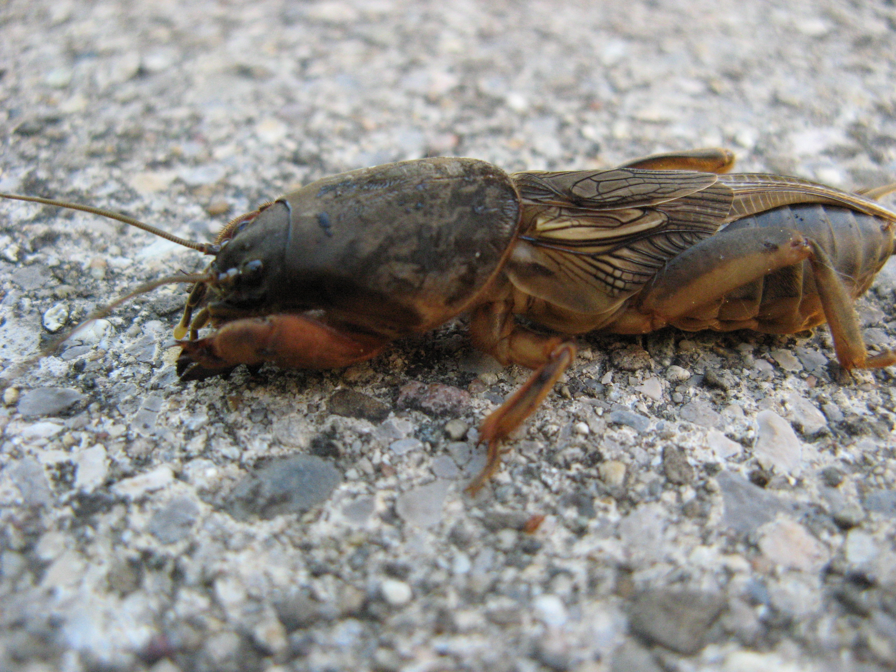 Mauswurfsgrille aus meinem Garten